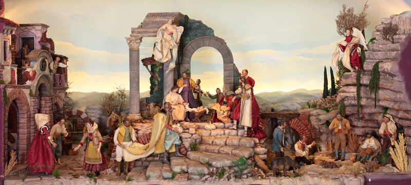 Nacimiento Anónimo napolitano. Siglo XVIII. Barro cocido, madera, cuerda, alambre y tejidos. Depósito de la Diputación Foral de Álava. Donación de Félix Alfaro Fournier. Escenario realizado por la Asociación Belenista de Álava e inaugurado el 21/12/2005 (ver